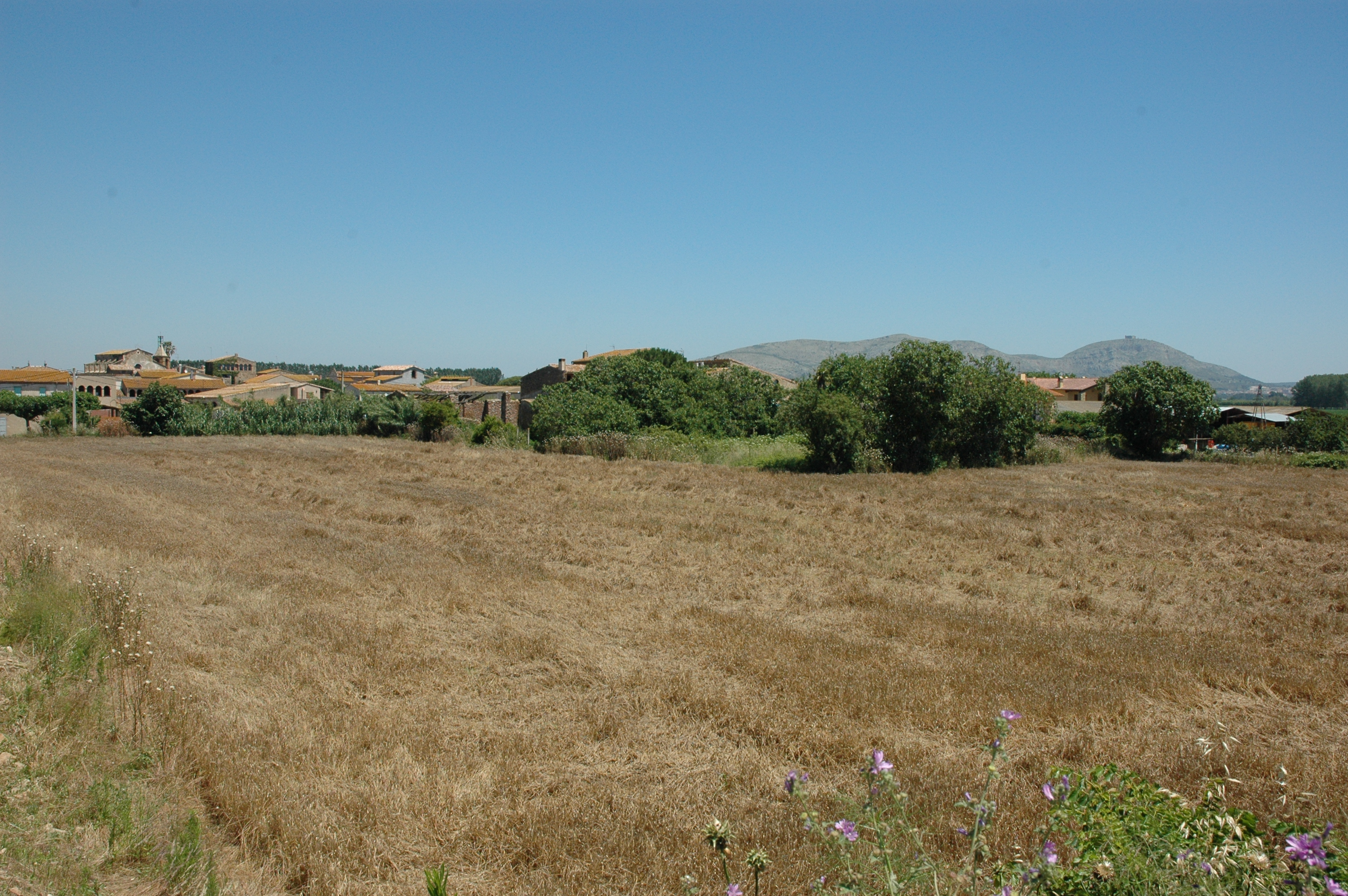 Serra de Daró